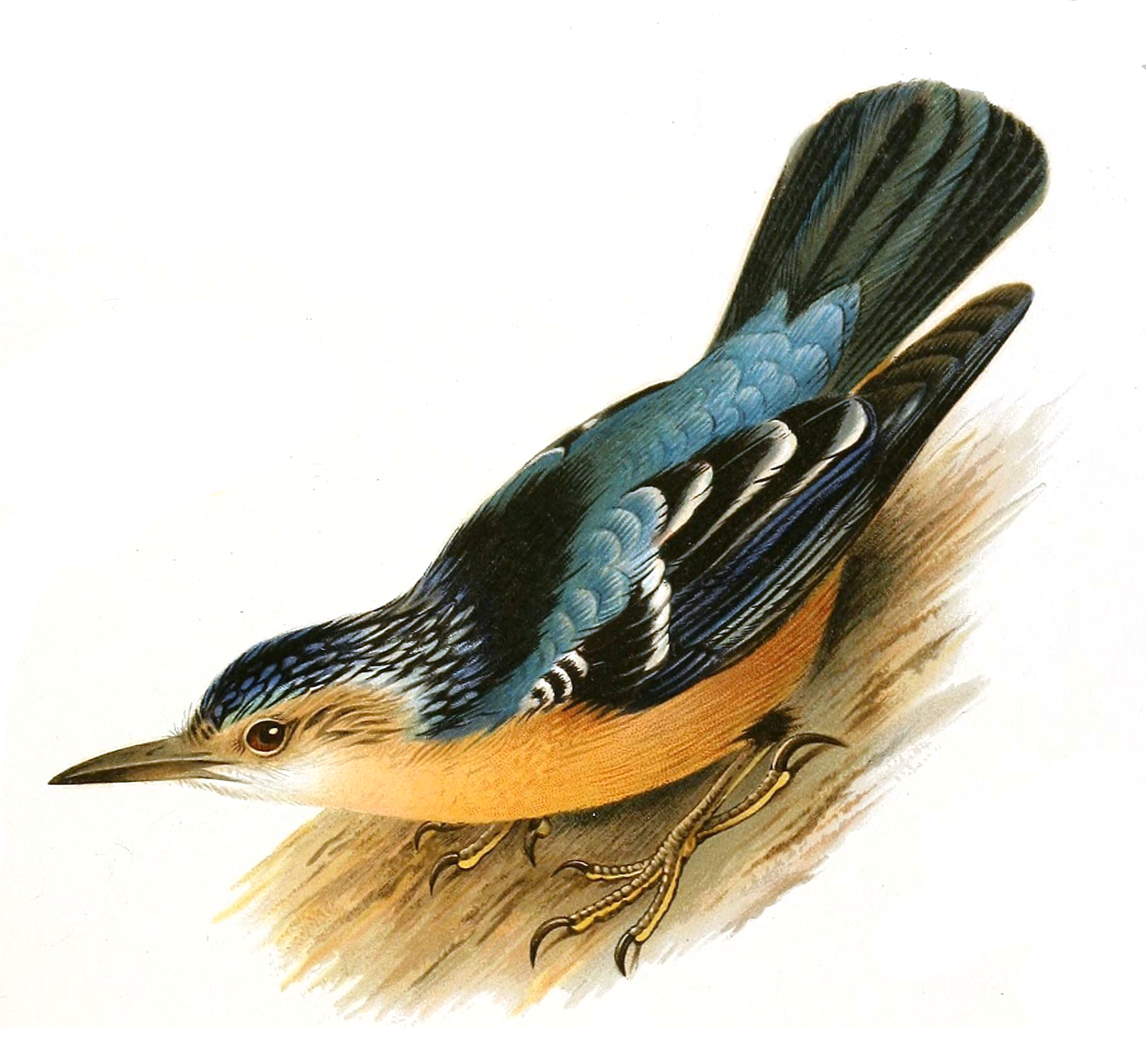 Sitta formosa (cropped)